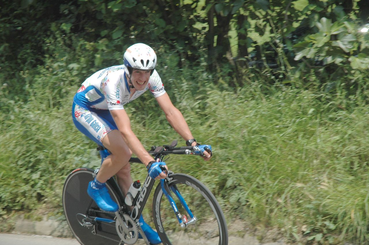 Isidro Nozal, Euskal Bizikleta 2007